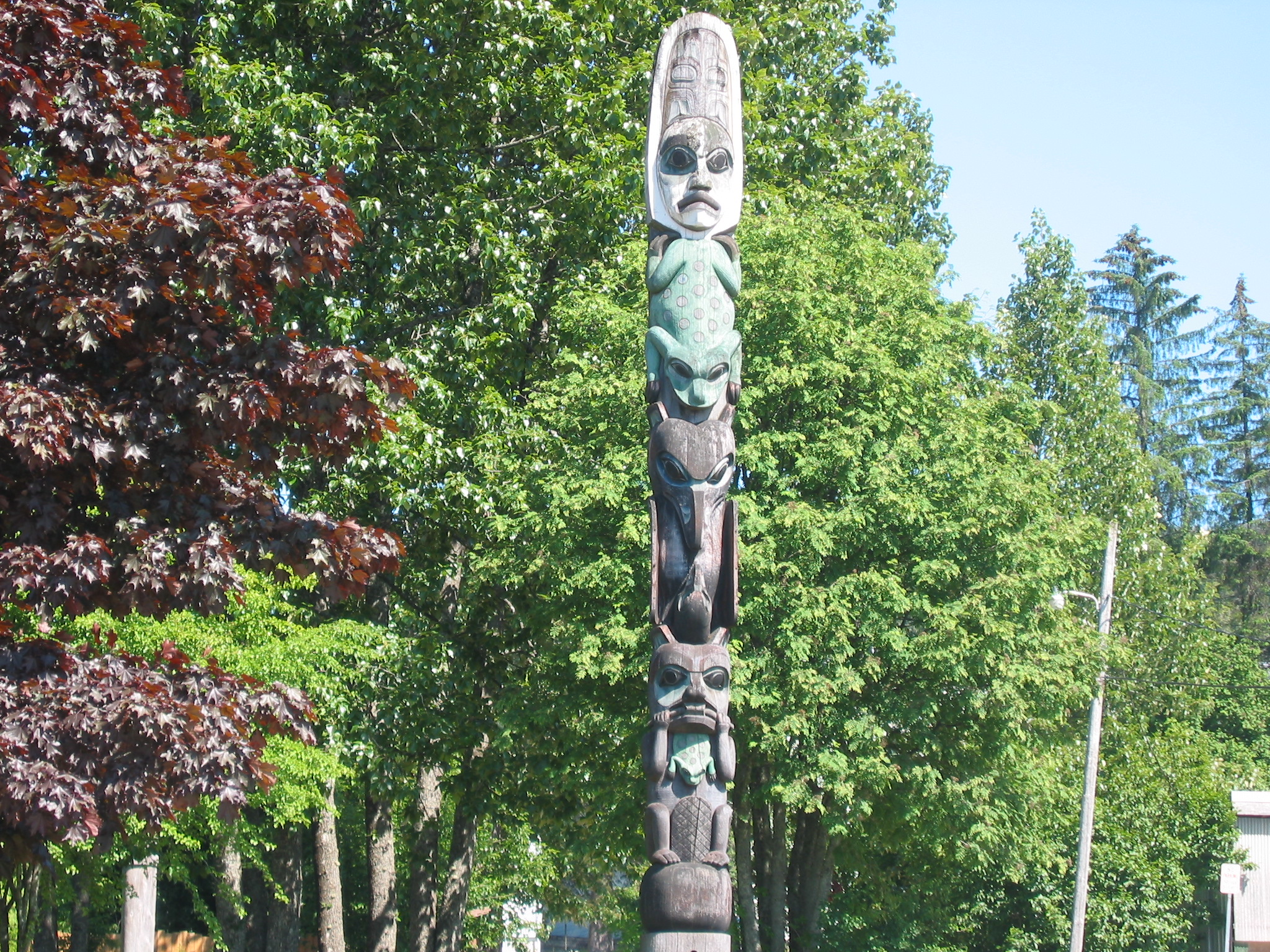 The Kiks.ádi totem pole in Wrangell, Alaska.